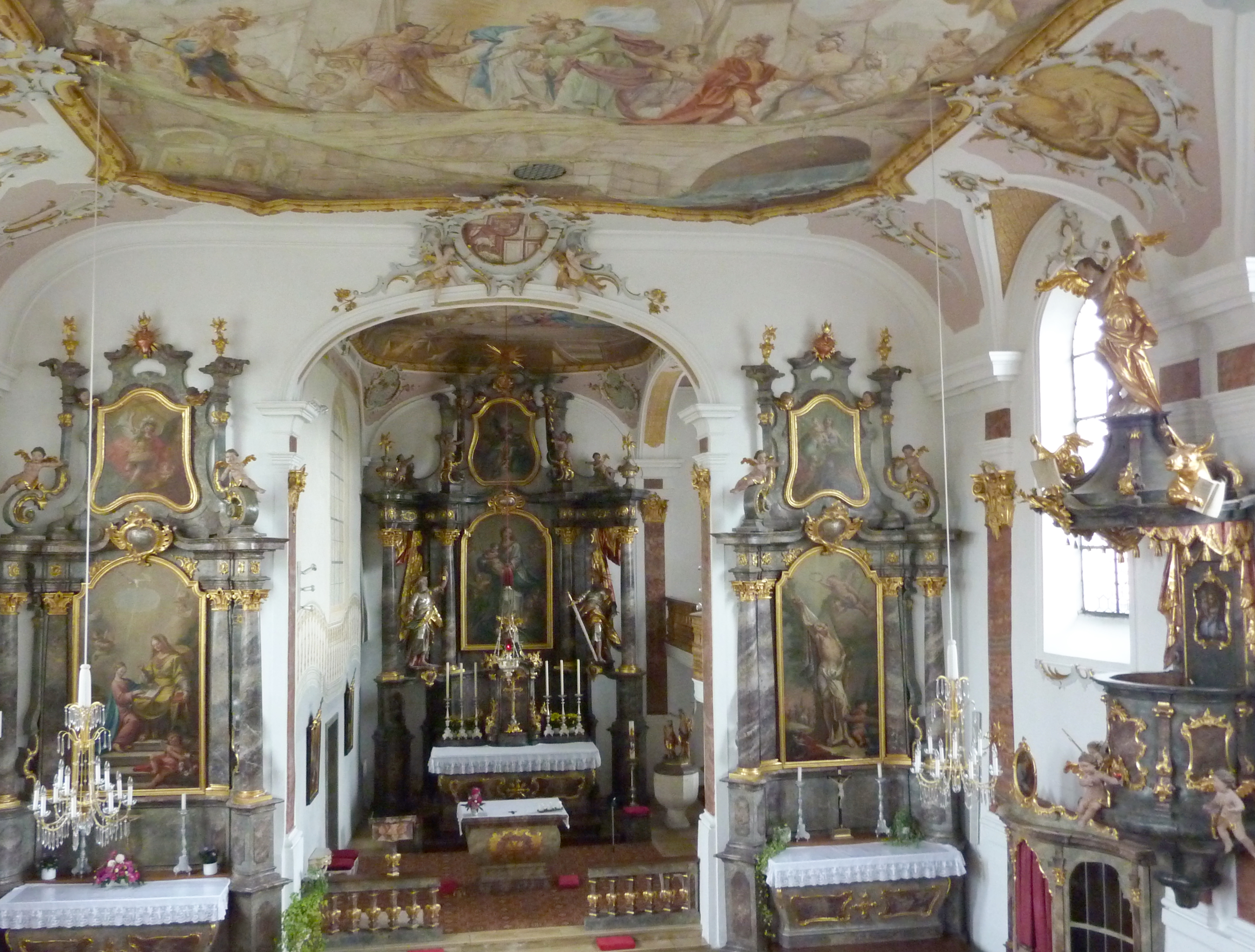 Katholische Pfarrkirche Mariä Reinigung in Steinheim (Dillingen an der Donau), Innenansicht mit Blick zum Chor